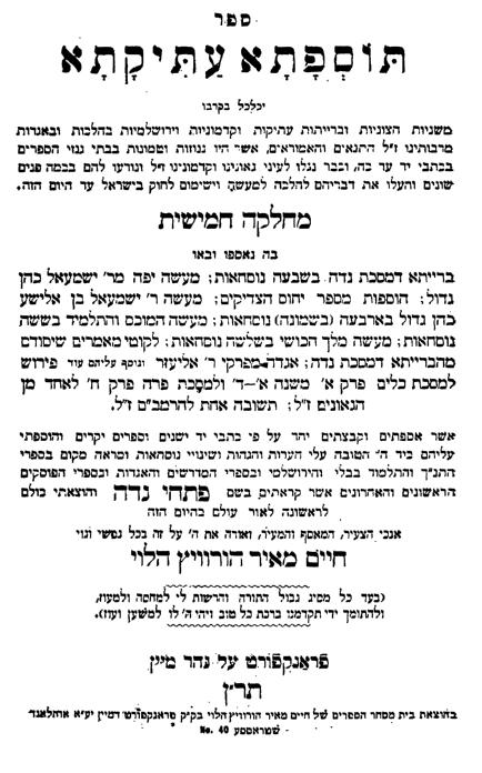 צילום שער